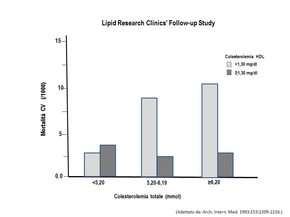 Mortalità CV nel sesso femminile in relazione al colesterolo totale e alle HDL. Corretta per età.